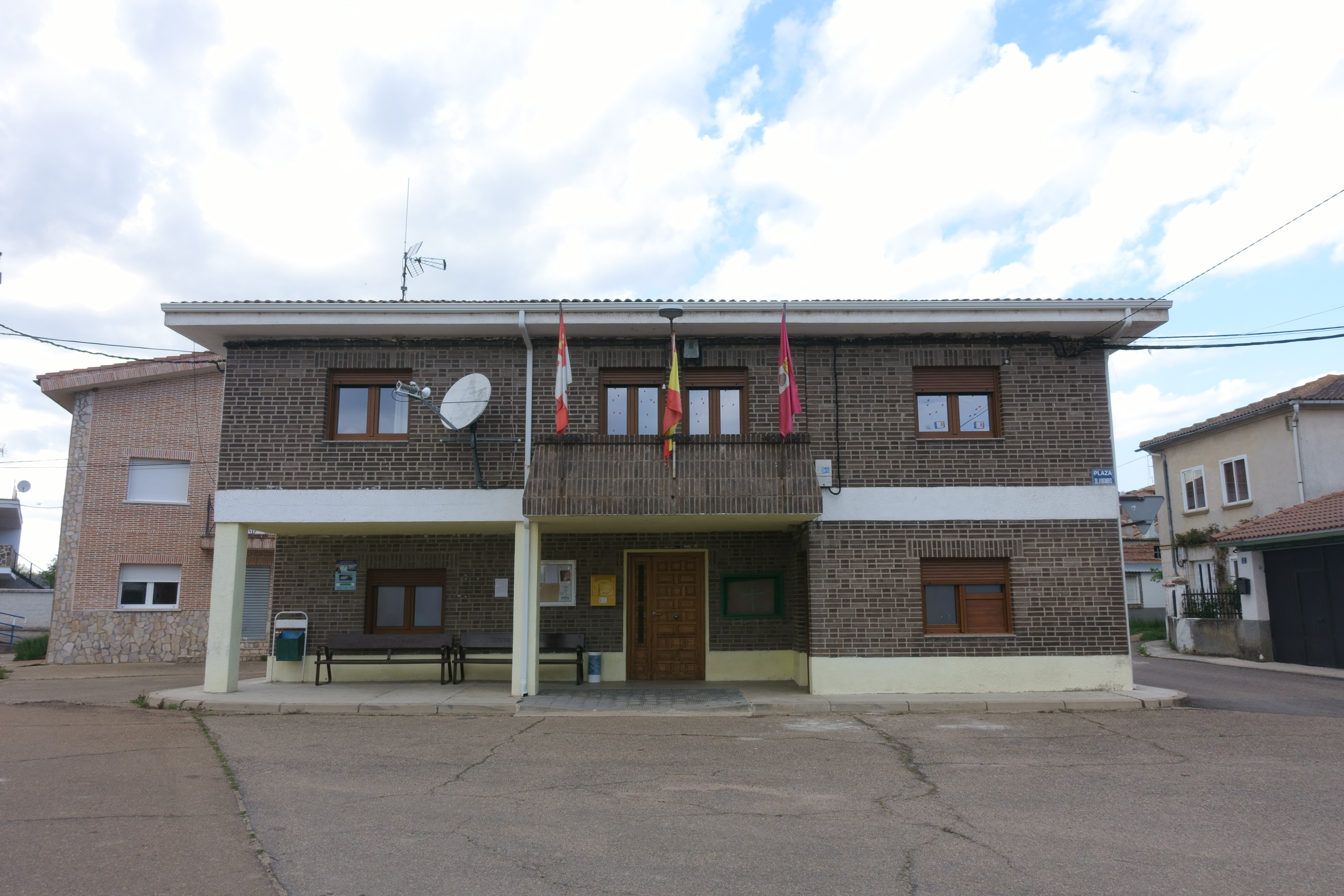 Casa consistorial de Fresno del Río (Palencia, España).